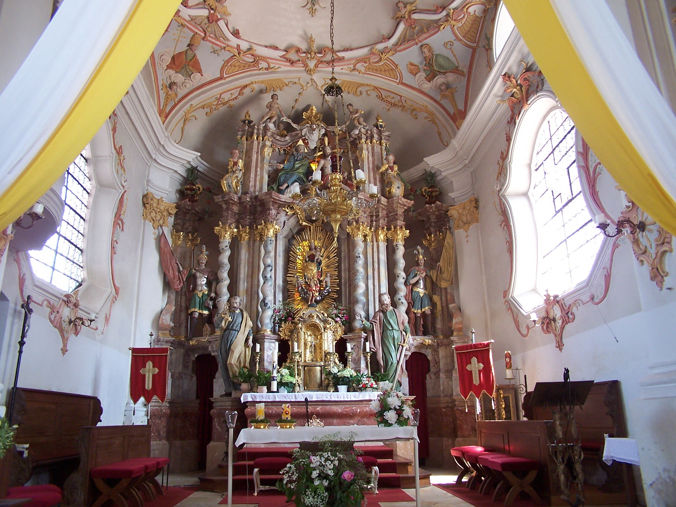 Rottenburg an der Laaber. Oberhatzkofen, Schulweg 3. Katholische Pfarrkirche Mariä Himmelfahrt. Der Hochaltar ist ein stattlicher Stuckmarmoraufbau mit vier Pilastern, vier gewundenen Säulen und großem Aufsatz mit Pilastern und Vasen. Eine gotische Holzfigur St. Maria mit Jesuskind um 1480 bildet das Zentrum des Altares.